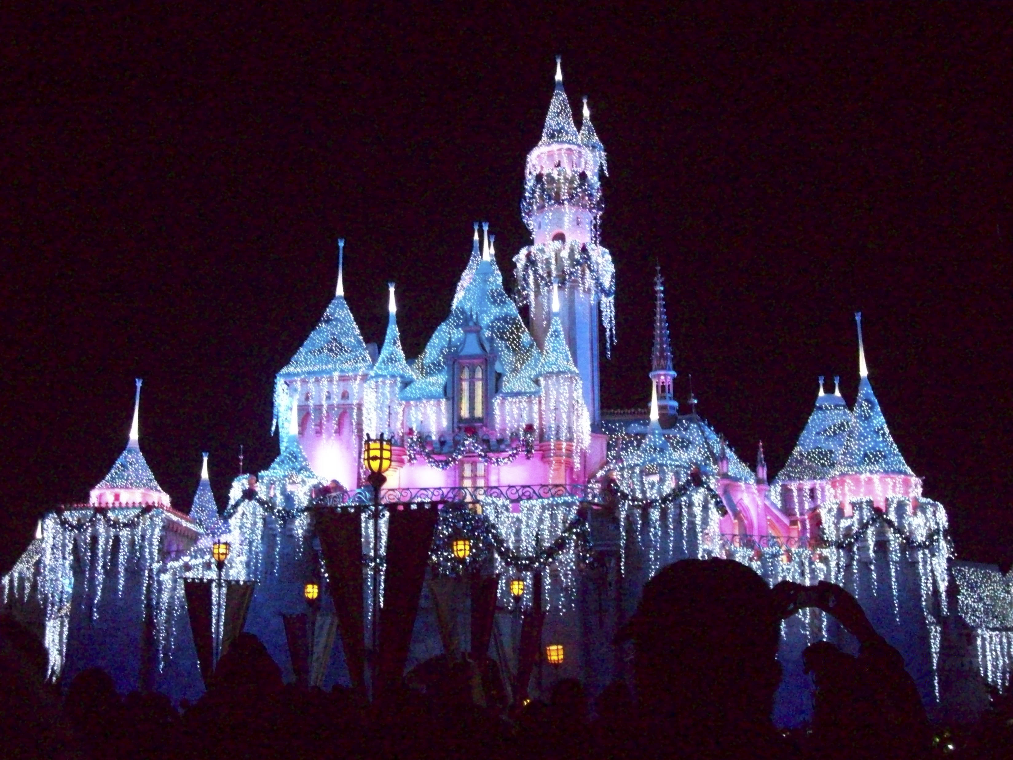 Castillo de La Bella Durmiente decorado para las festividades navideñas de noche.